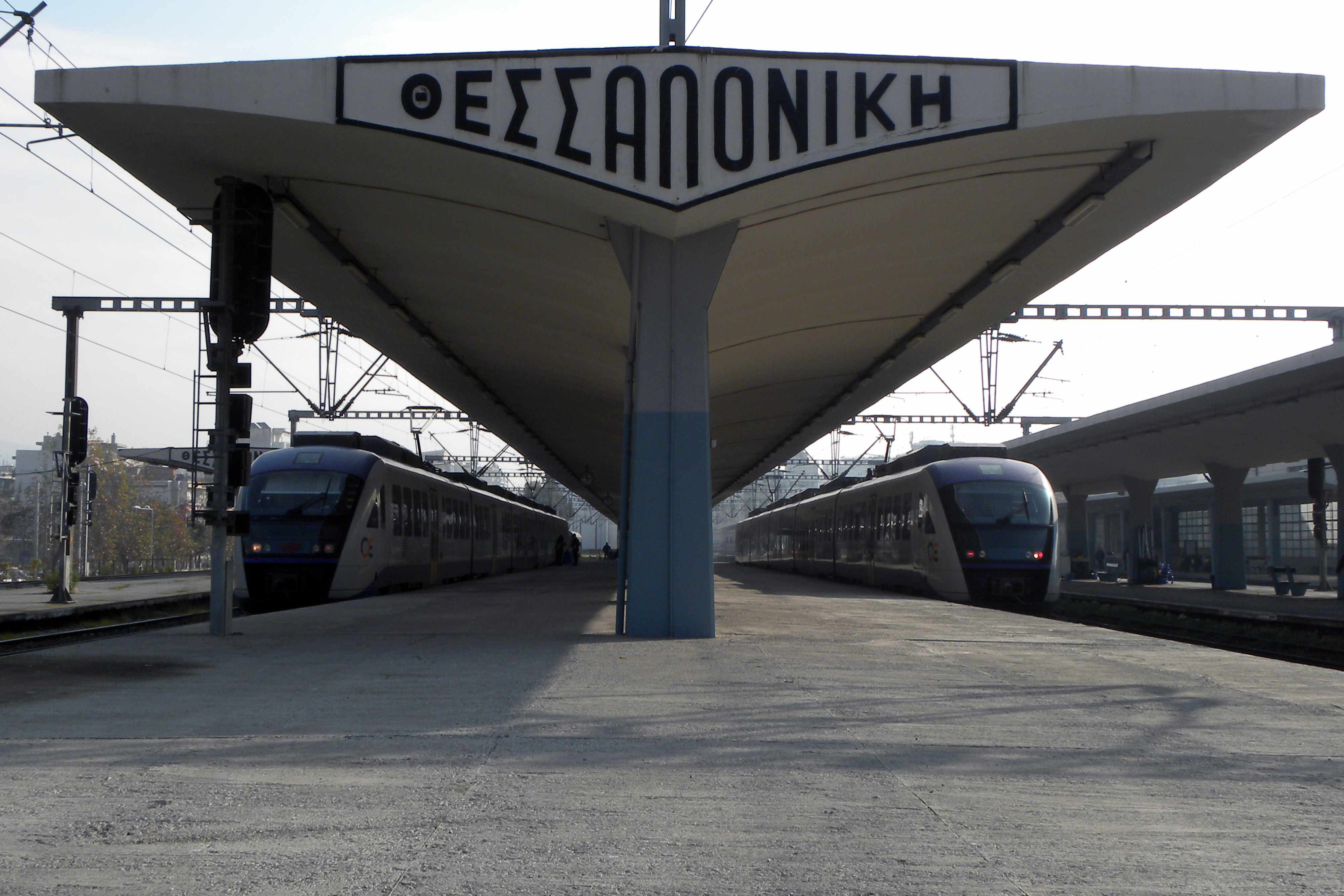 Ο Σ. Σταθμός της Θεσσαλονίκης